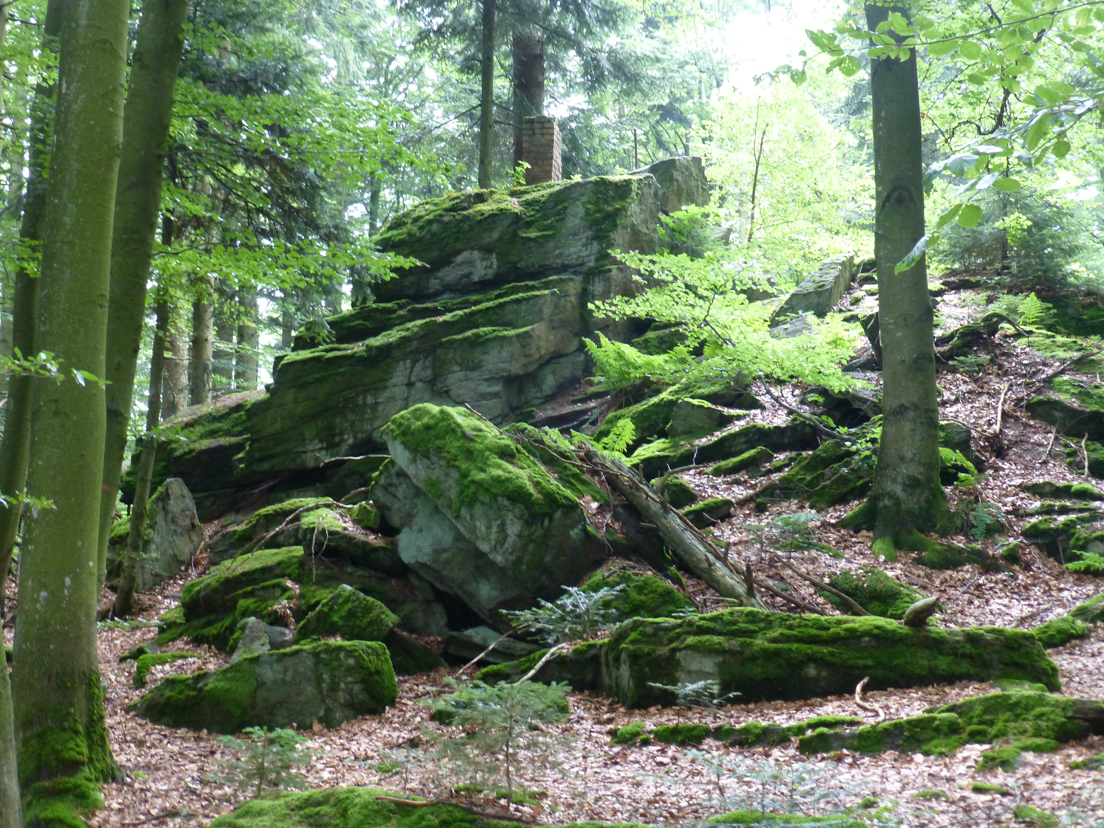 Gipfel des Hausstein. Blick von Nordosten auf die Felsblöcke und den gemauerten Ziegelturm